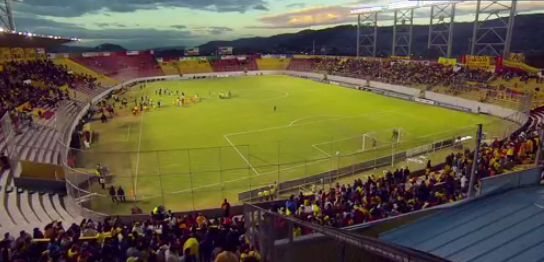 Стадион Гонсало Посо Рипальда